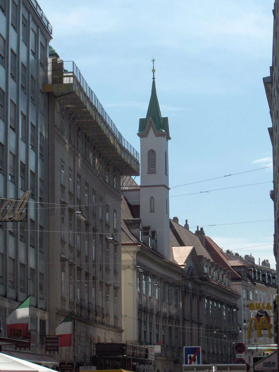 Deutschordenskirche in Vienna, Austria